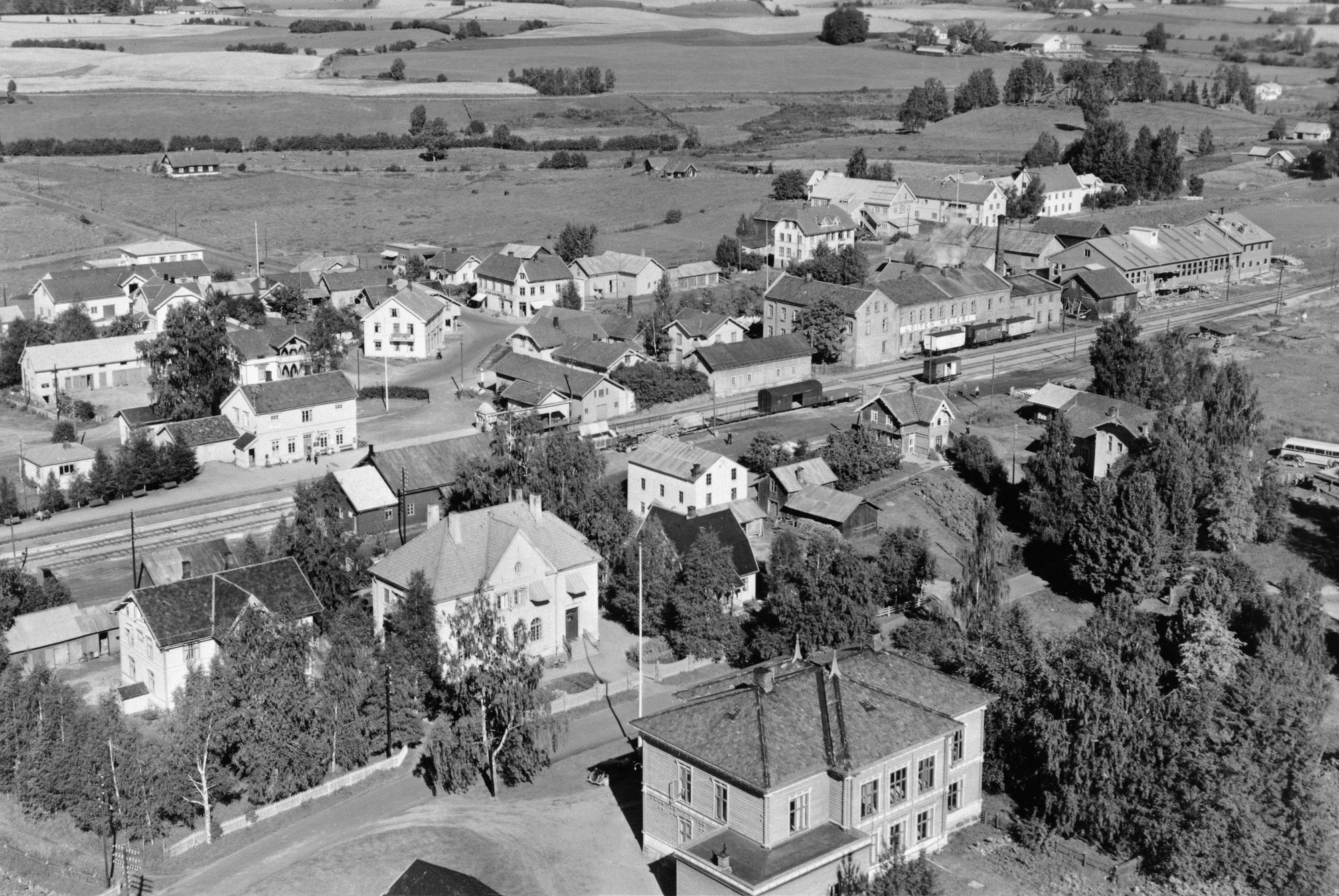 Løten sentrum og stasjon 1951, Tingberg i forgrunnen